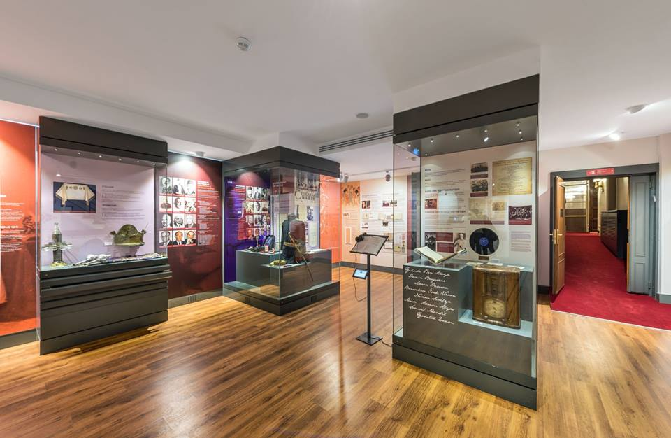 Müze 1. Kattan genel görünüm